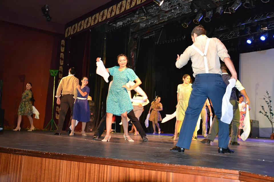 "Zamba" (Bailarines del Ballet Malevo, La Rioja.)